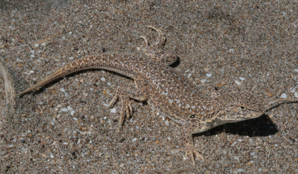 foto Liolaemus multimaculatus